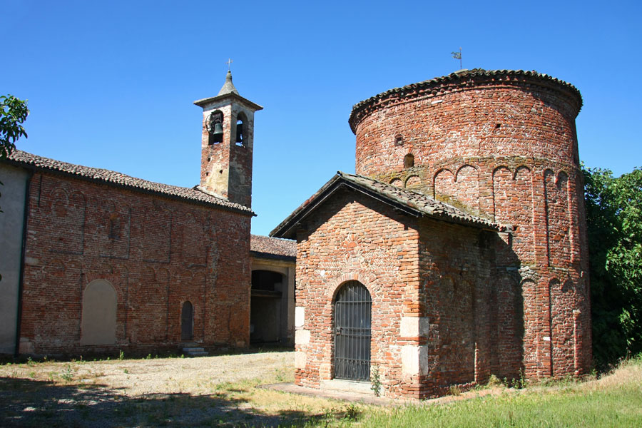 Chiesa e battistero della romanica Pieve di Velezzo (PV)